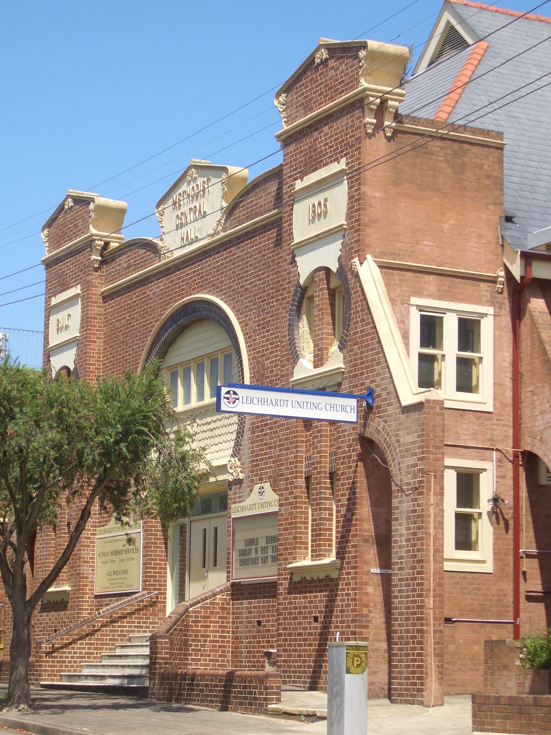 Leichhardt Methodist Central Hall, Uniting Church